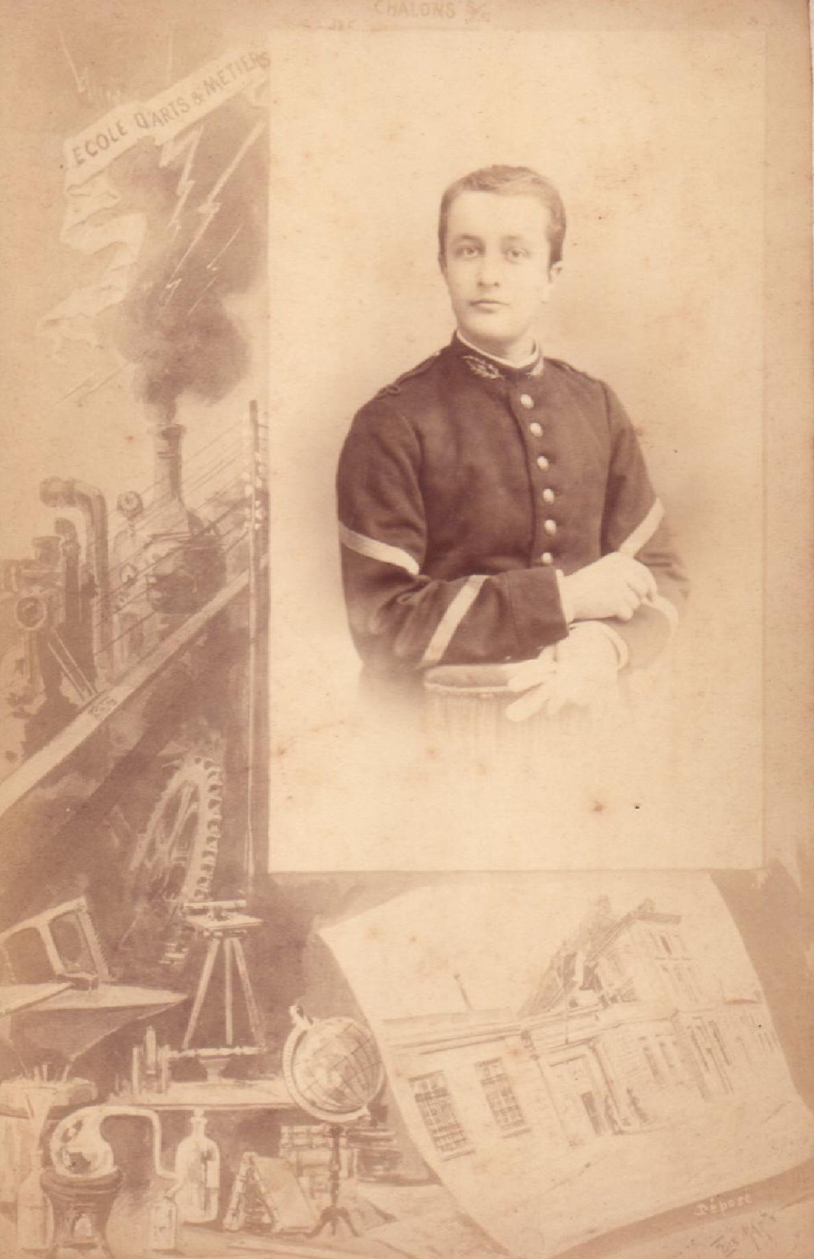 Ecole des Arts et Métiers de Châlons-sur-Marne, vers 1895